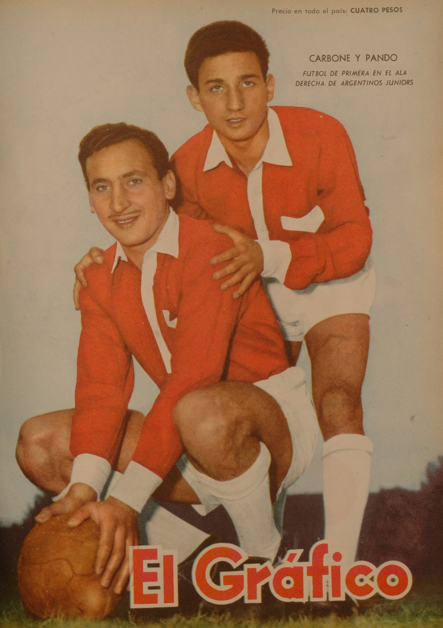 El Grafico del 05 de Febrero de 1959. Edicion 2056